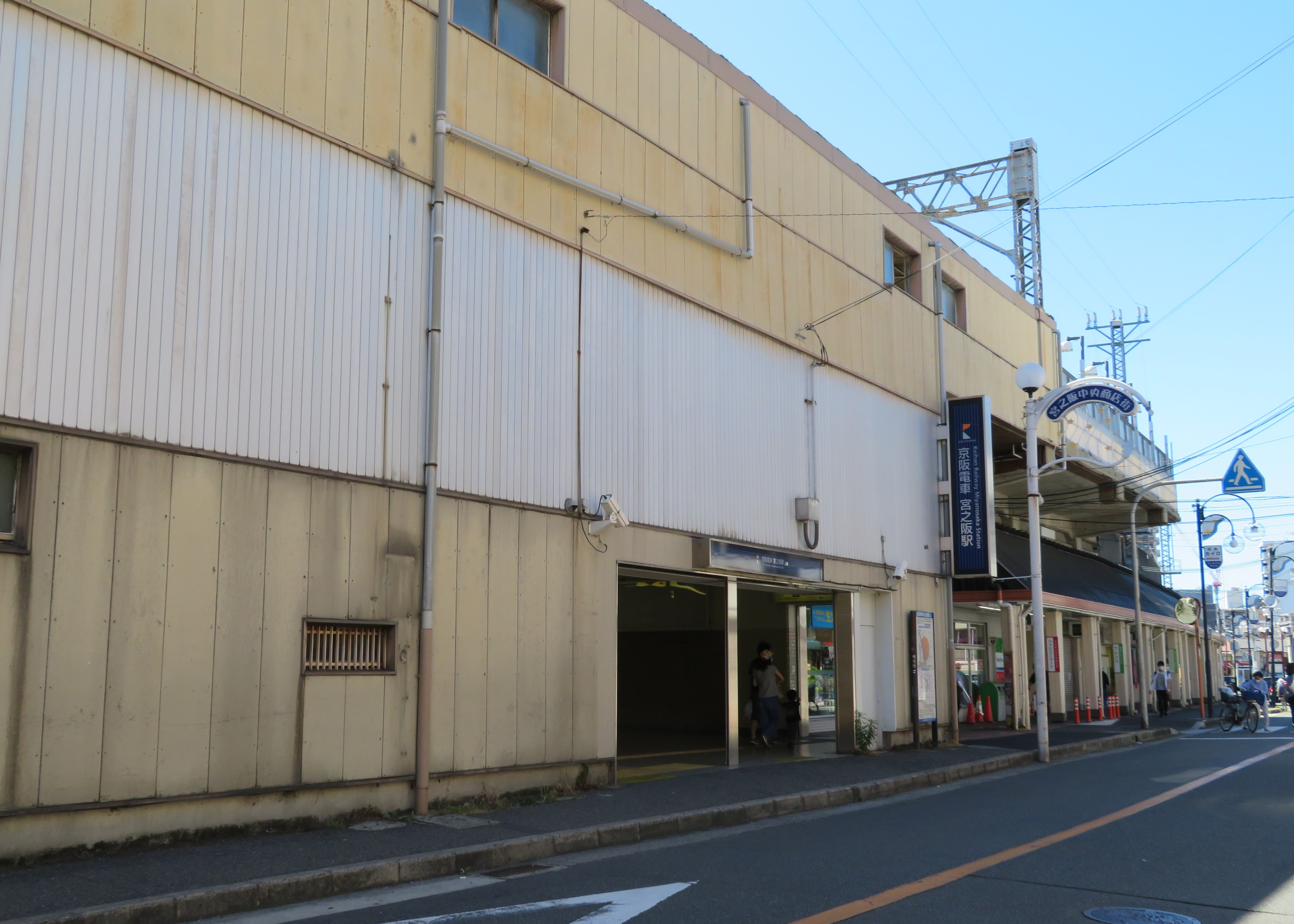 京阪電鉄宮之阪駅